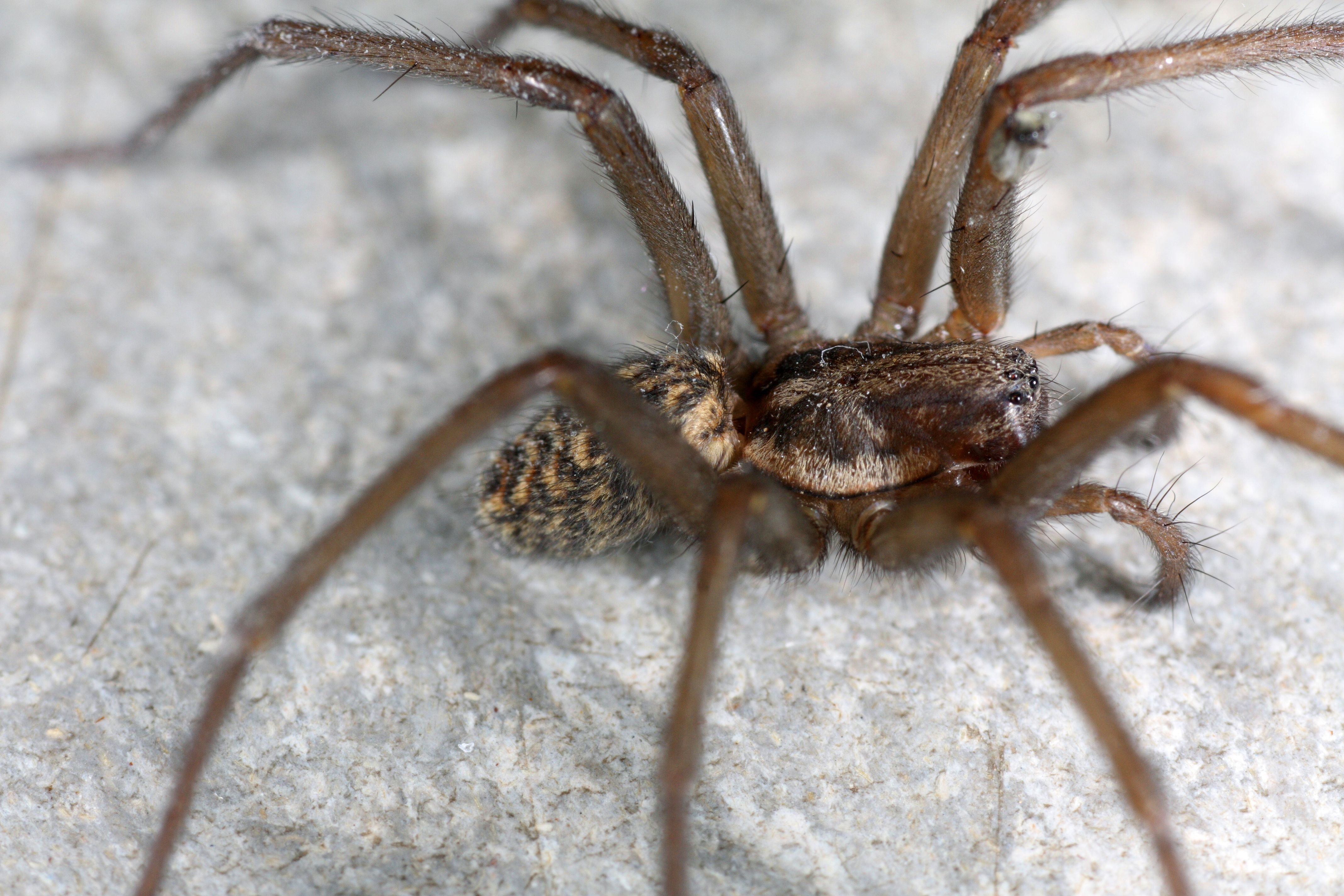 Voksen hunn av stor husedderkopp Tegenaria atrica fra siden. Et godt kjennetegn er lyse, lange ben uten mørkere ringer.